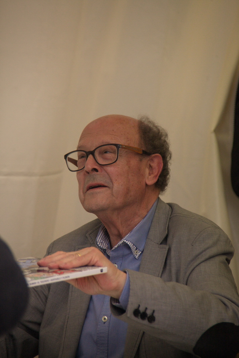 Signatura de llibres en la Diada de Sant Jordi-2015 a Barcelona